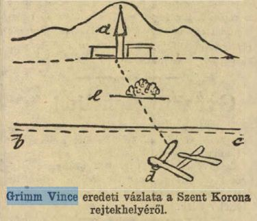 Grimm Vince (1801-1872) eredeti vázlata a magyar szent korona rejtekhelyéről Orsovánál.